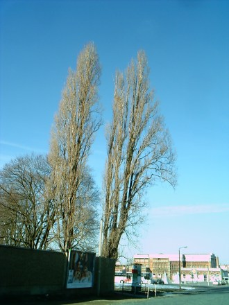 Pappel im Winter Standort Halberstadt wie die Eiben auch